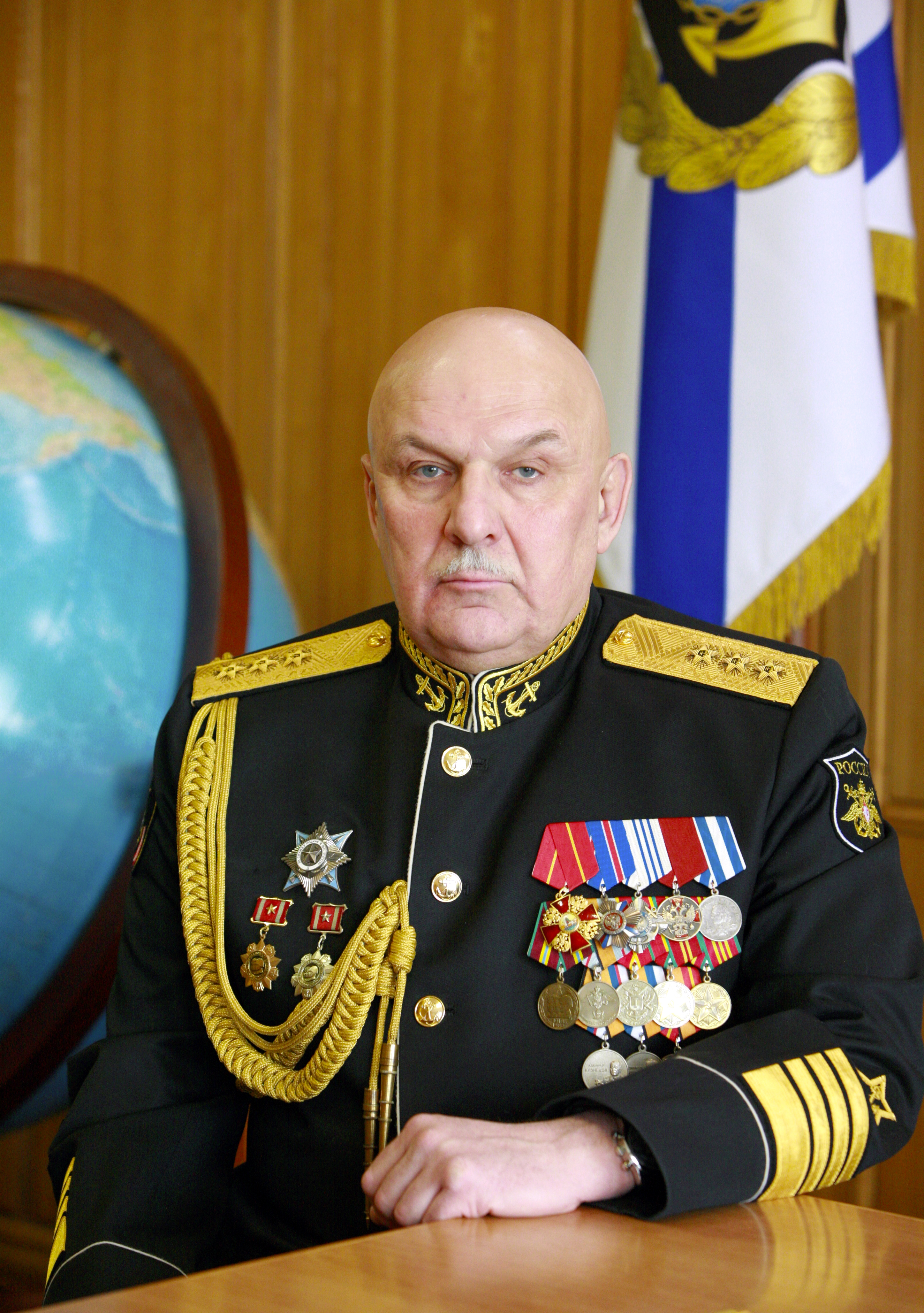 Командующий Тихоокеанским флотом адмирал Авакянц Сергей Иосифович